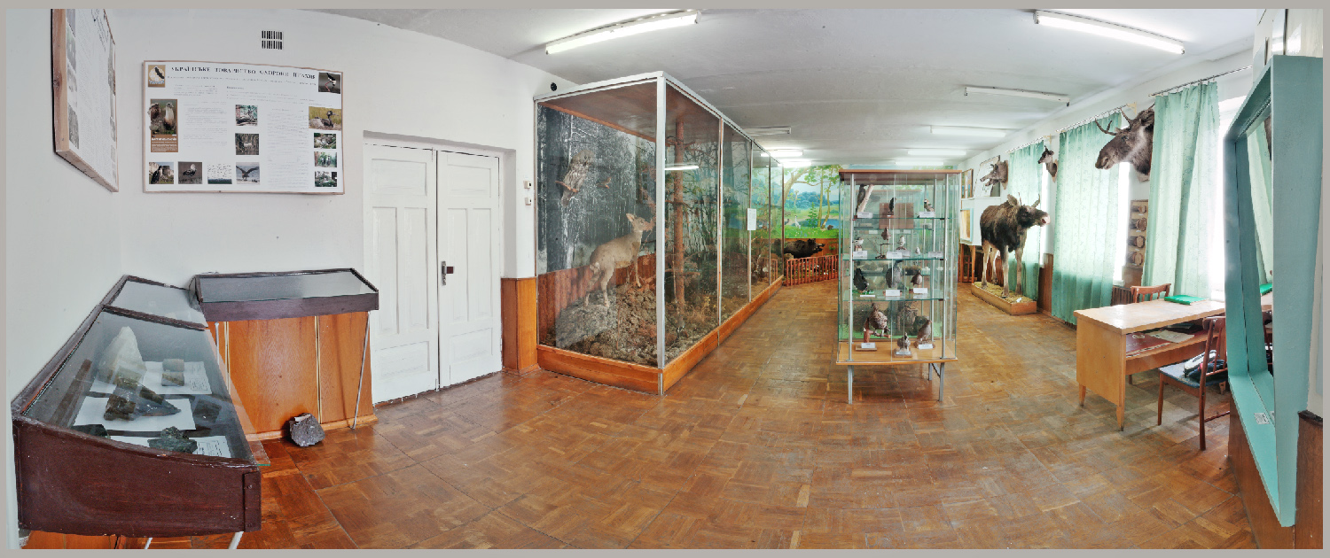 Поліський природний заповідник, Овруцький район, с. Селезівка, Копищанське і Перганське лісництва ДП «Олевське ЛГ» та Селезівське лісництво ДП «Словечанське ЛГ»